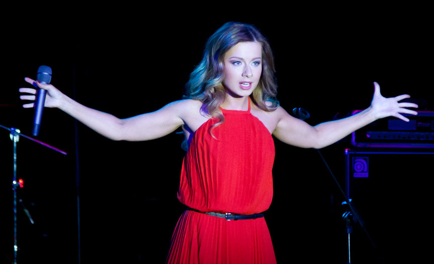 Российская певица Юлия Савичева в Северодвинском театре драмы. Организатор гастролей - концертное агентство Северяночка